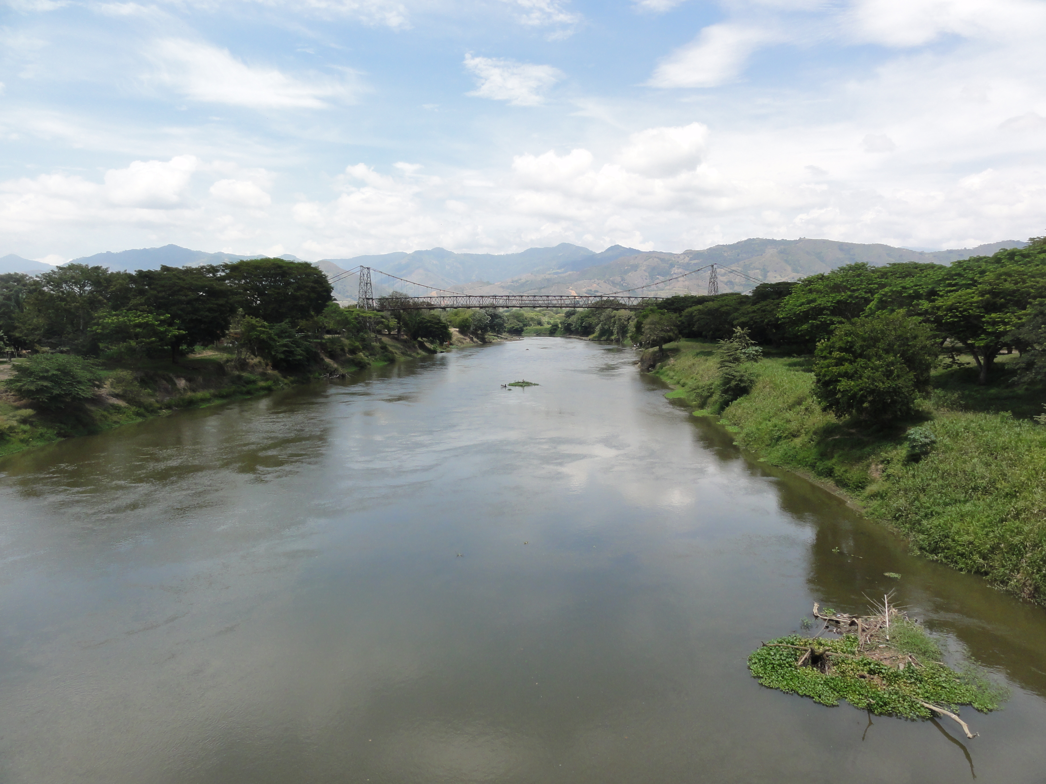 Río Cauca. Puente Anacaro (3). Cartago - Ansermanuevo, Valle, Colombia.